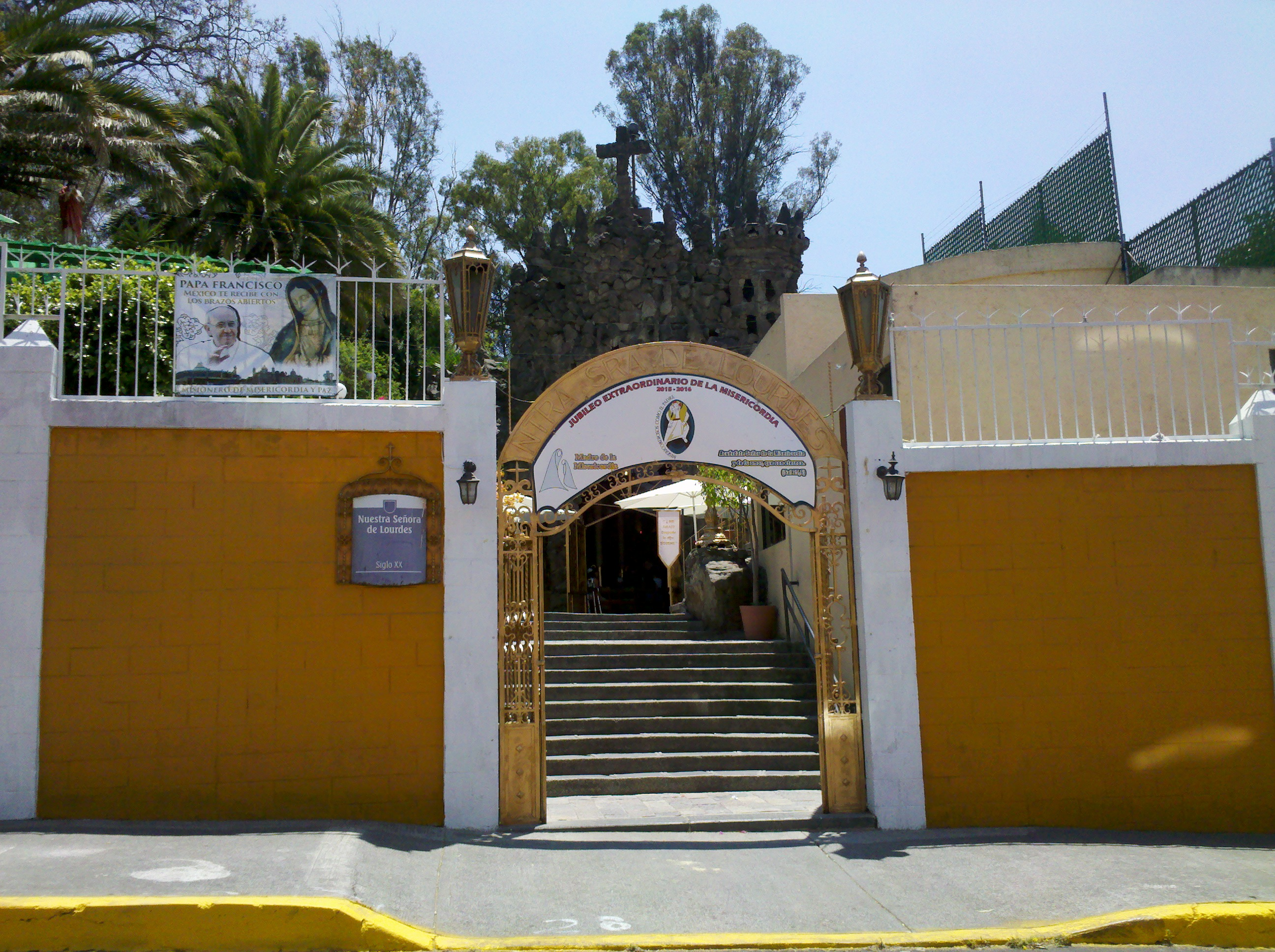 Capilla Gruta de Nuestra Señora de Lourdes, Puebla, México. Siglo XX. Calzada los Fuertes 2812.